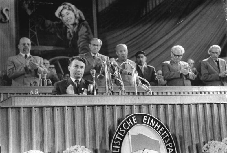 Zentralbild Junge 12.7.1958. V. Parteitag vom 10. bis 16.7.1958 in der Werner-Seelenbinder-Halle, Berlin, 3. Tag: UBz.: Die Grüsse der polnischen Bruderpartei überbrachte das Mitglied des Politbüros des ZK der Polnischen Vereinigten Arbeiterpartei Jerzy Morawski, Sekretär des Zentralkomitees, im Präsidium von links nach rechts: Der Erste Sekretär des ZK der SED, Walter Ulbricht, Ministerpräsident Otto Grotewohl, Mitglied des Politbüros des ZK der SED, das Mitglied des Politbüros des ZK der KP Chinas, Dung Bi-wu, und Hermann Matern, Mitglied des Politbüros des ZK der SED.